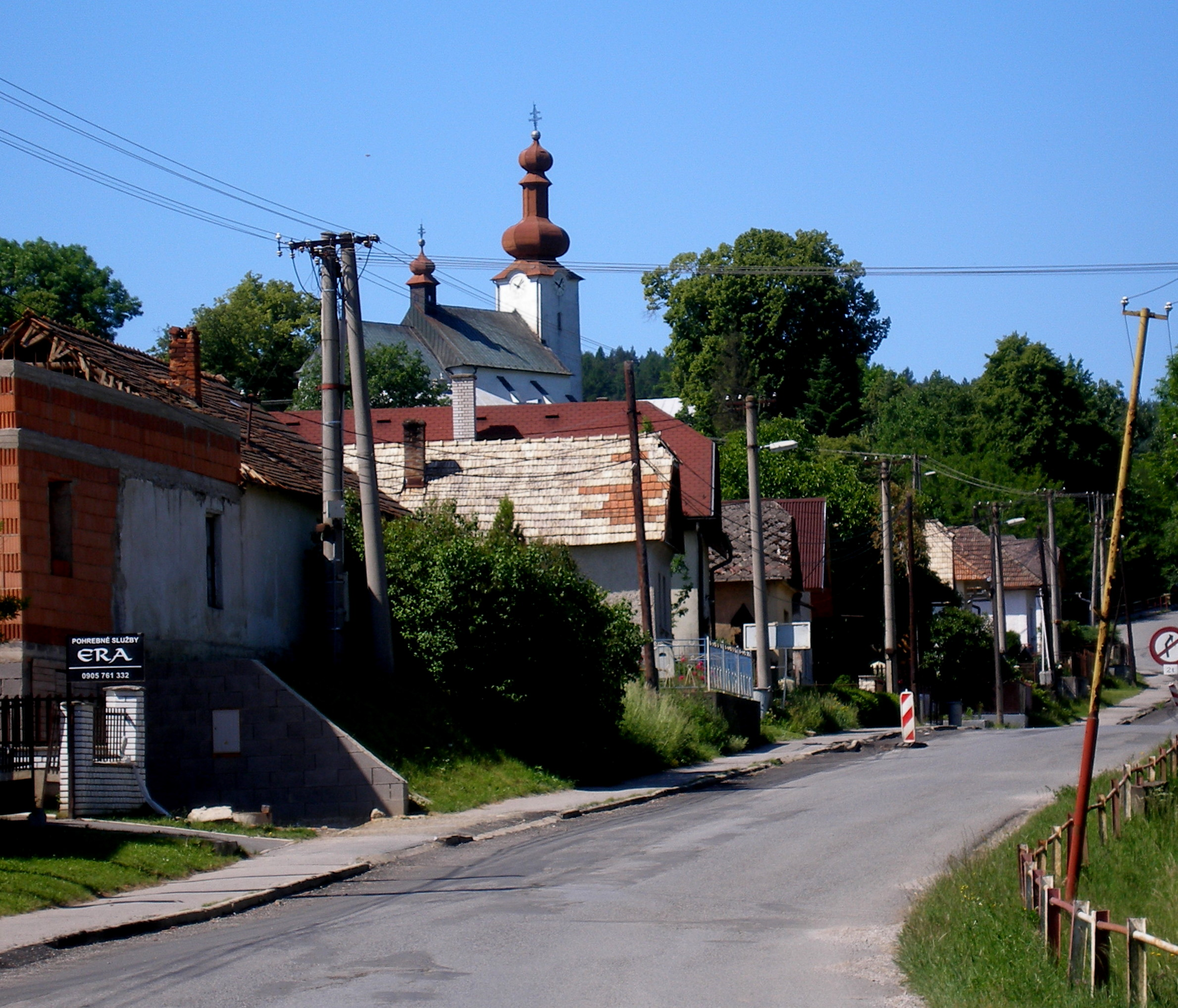 Obec Ražňany okres Sabinov